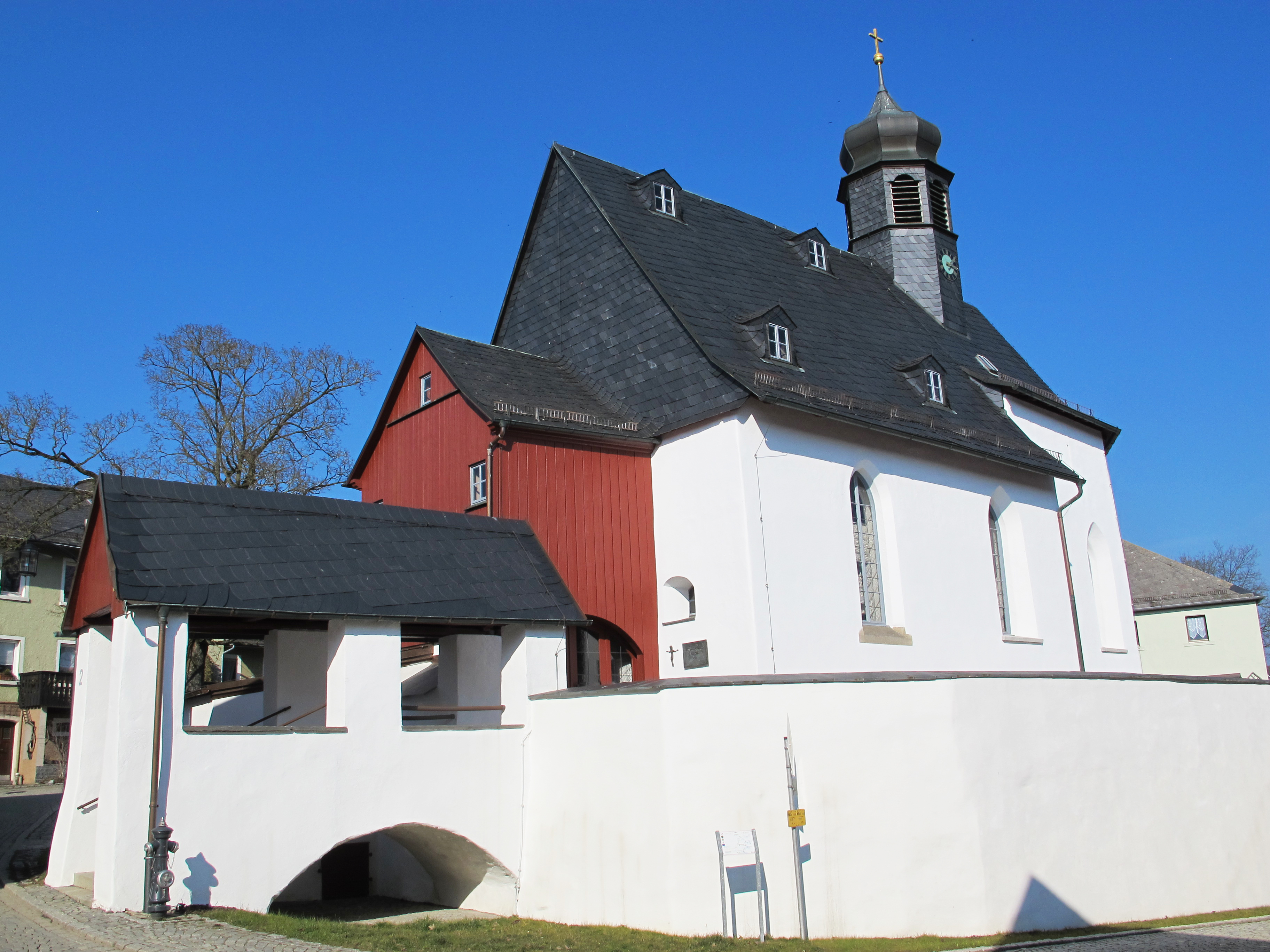 St. Leonhardkirche Köditz 2016